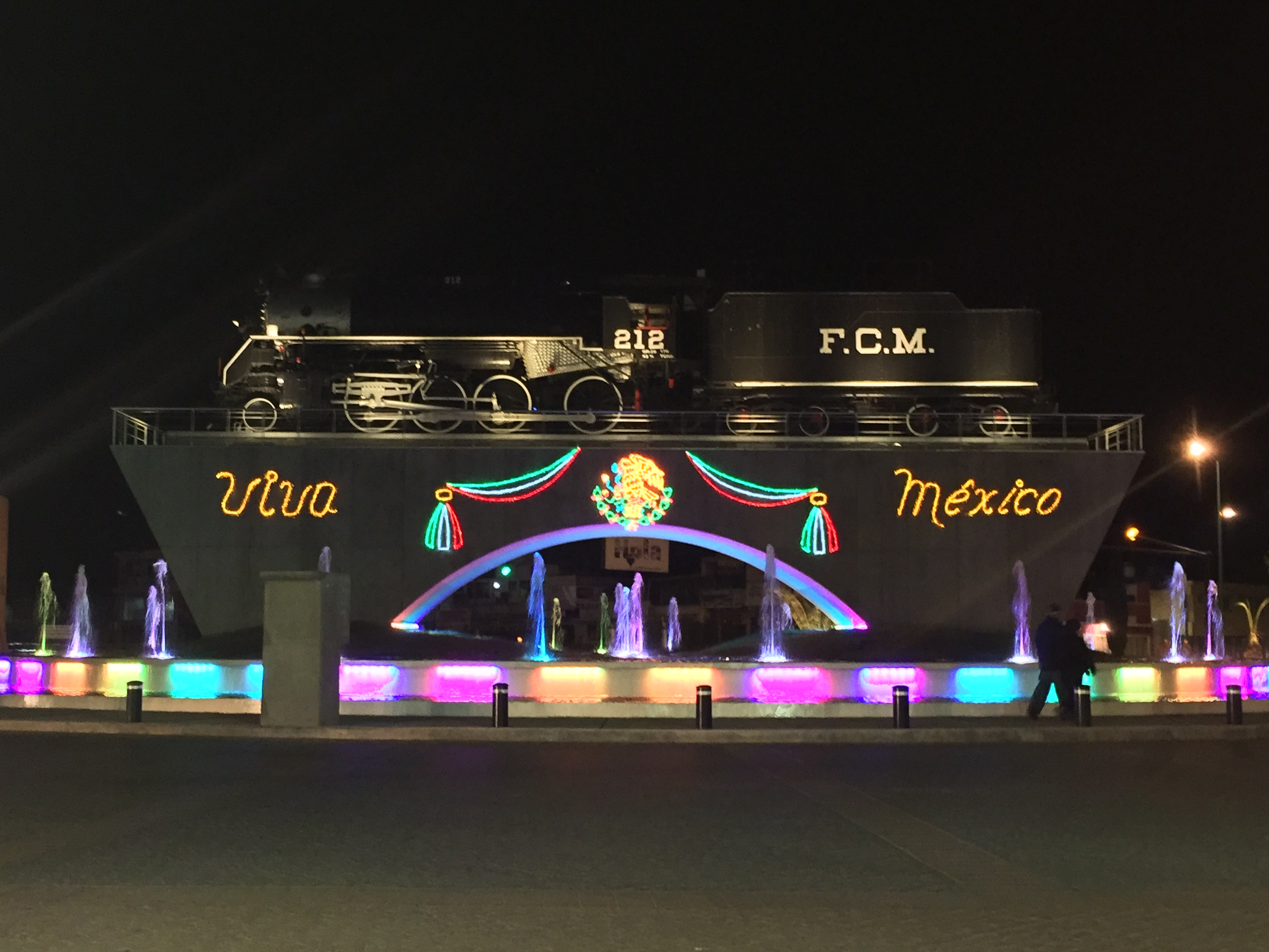 Maquinita